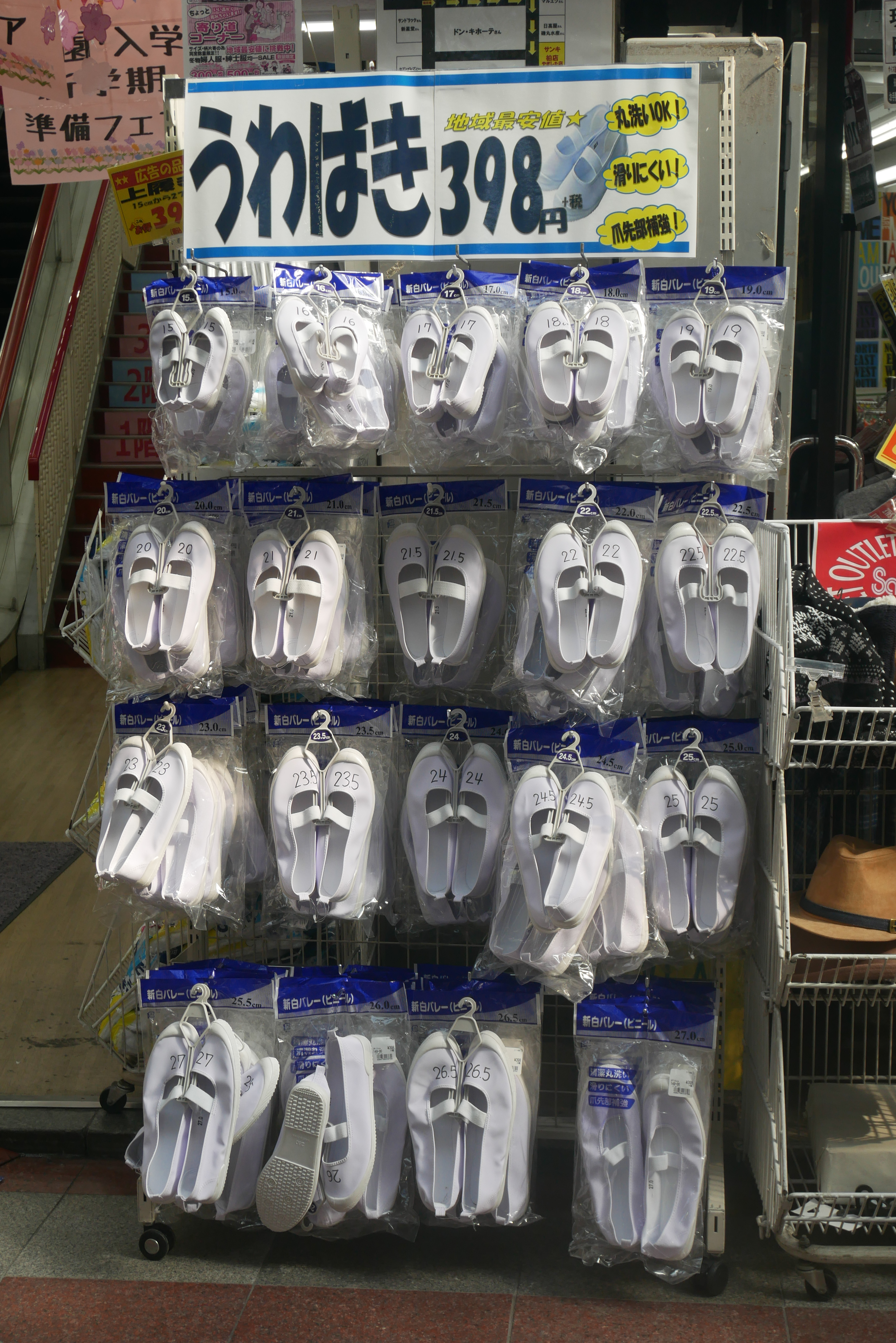 新学期を前にして販売されている上履き。「サンキ ニューサンキ店」（千葉県柏市）にて。